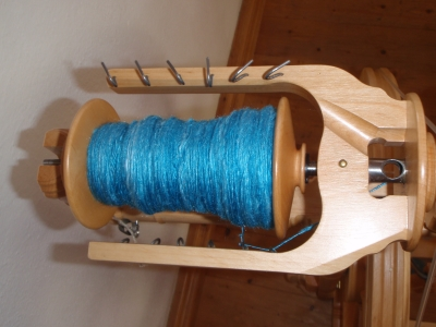 Kromski Sonata Spinnflügel